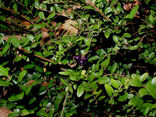 Lonicera nitida